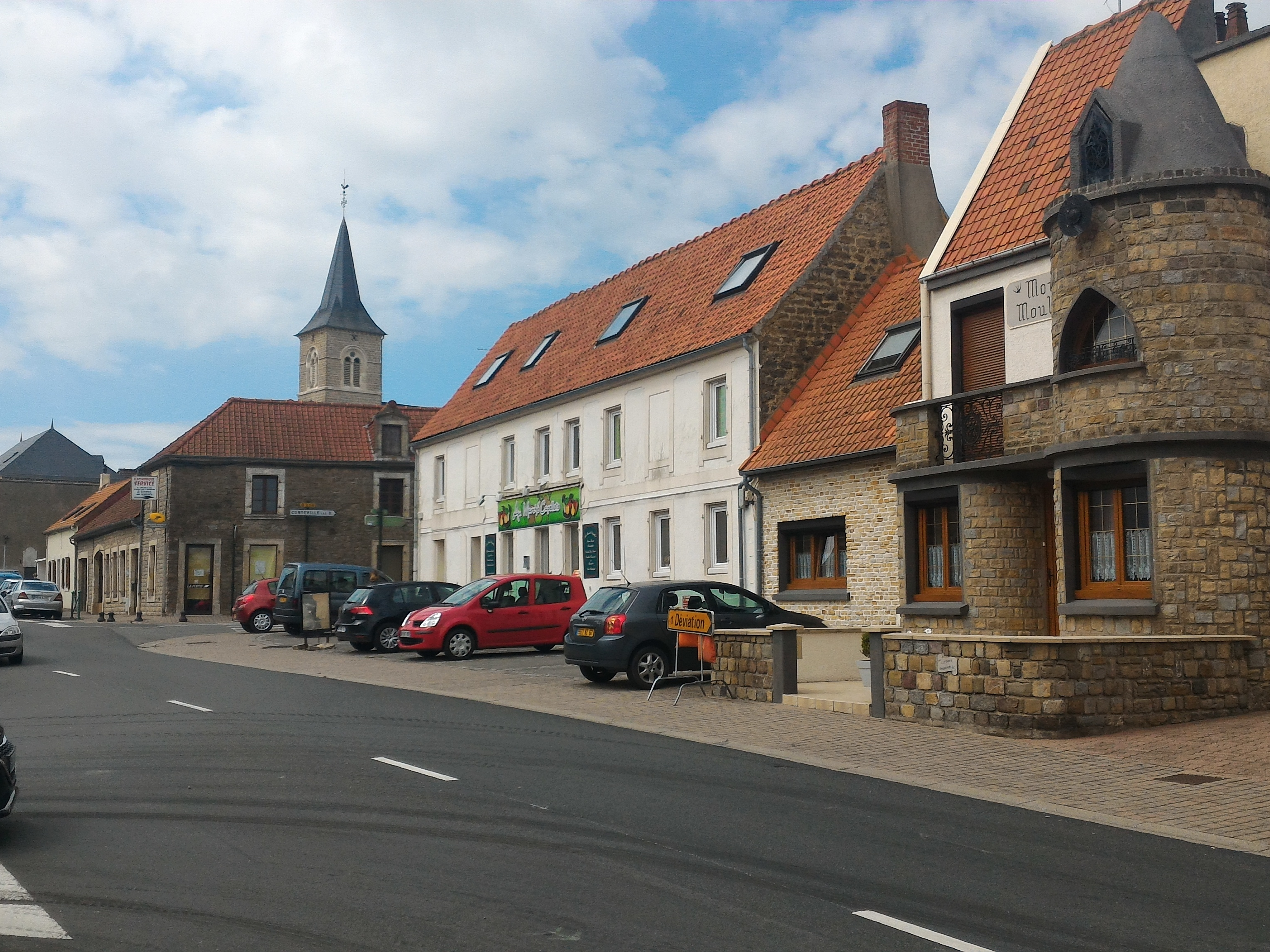 Avenue de la Forêt, La Capelle-lès-Boulogne, Pas-de-Calais